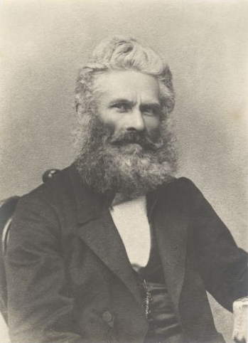 Friedrich Brauell, saksa loomaarst ja Tartu veterinaariakooli professor